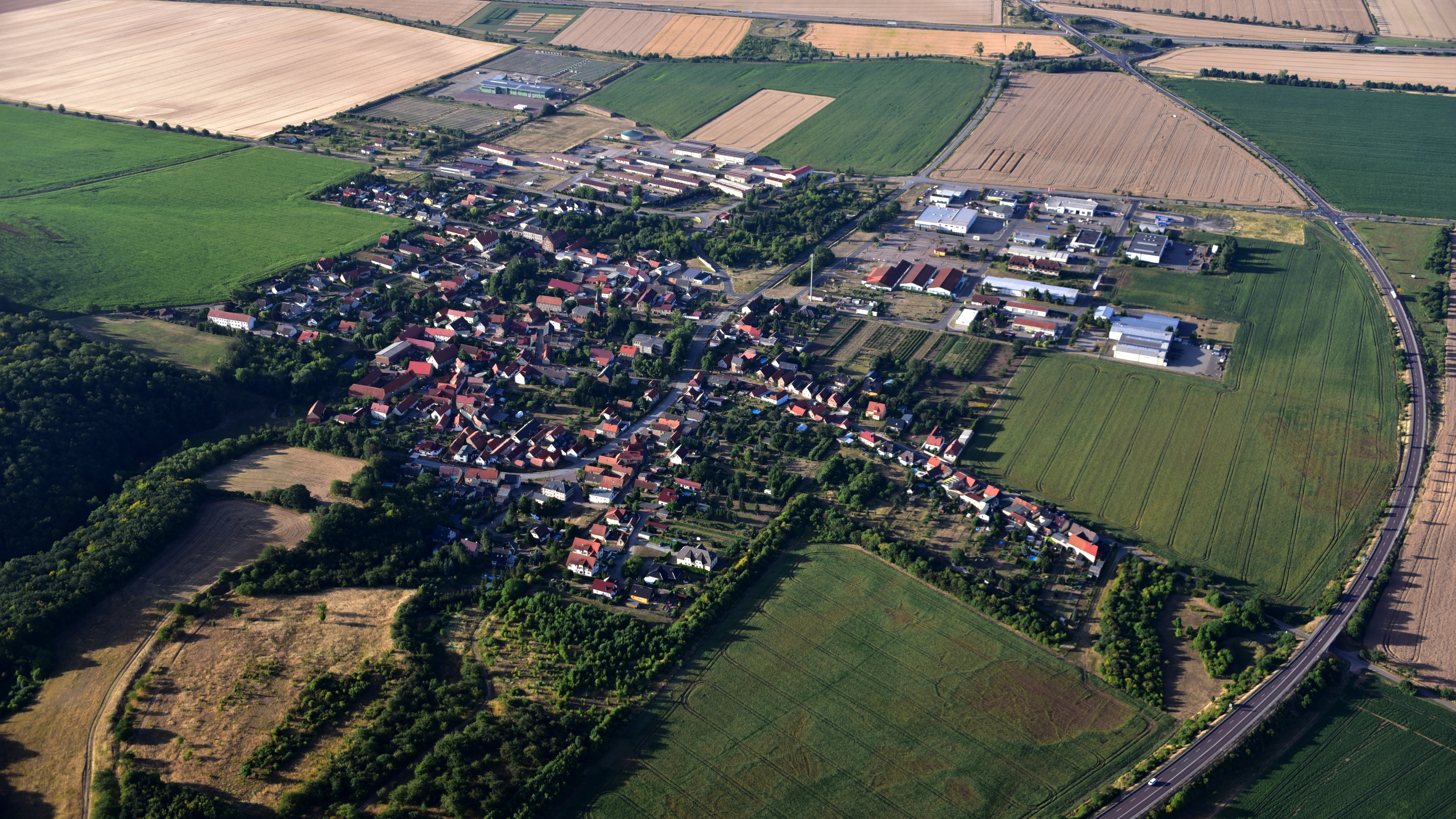 Rothenschirmbach, Luftaufnahme (2018)